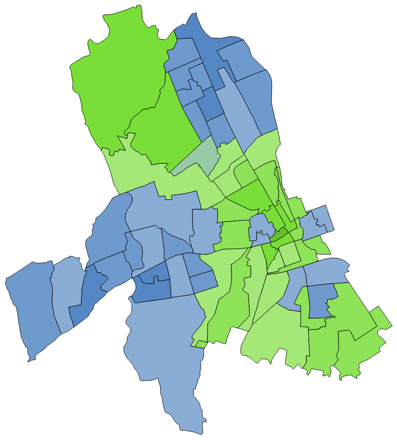 中文（台灣）: 顏色對照表